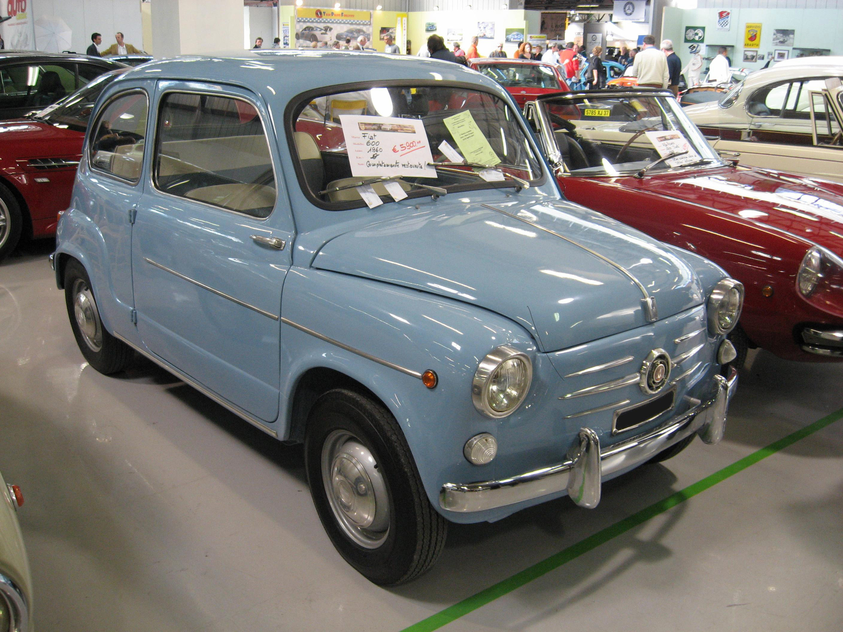 Fiat 600 3ª serie del 1960